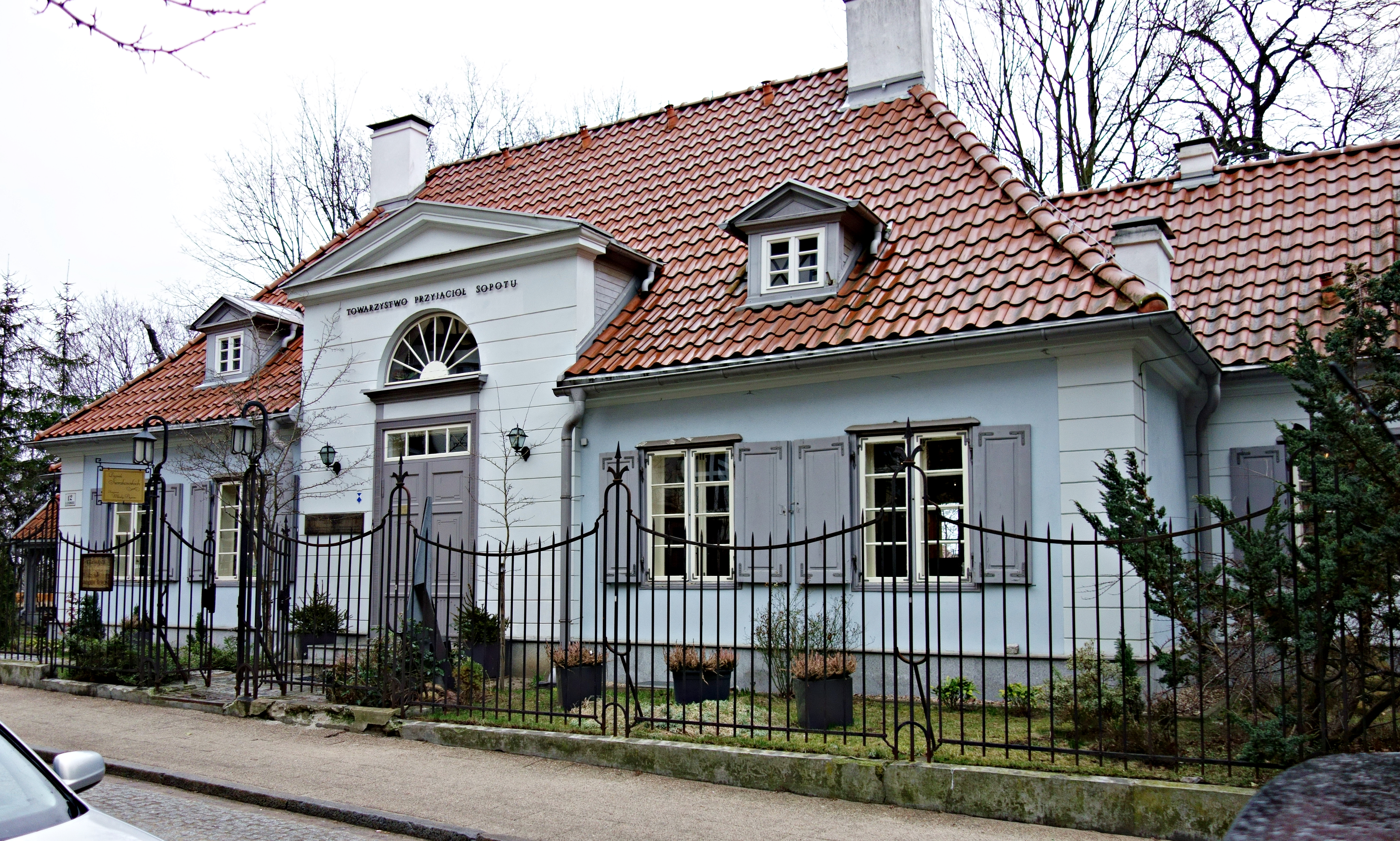 Sopot, Dworek Sierakowskich